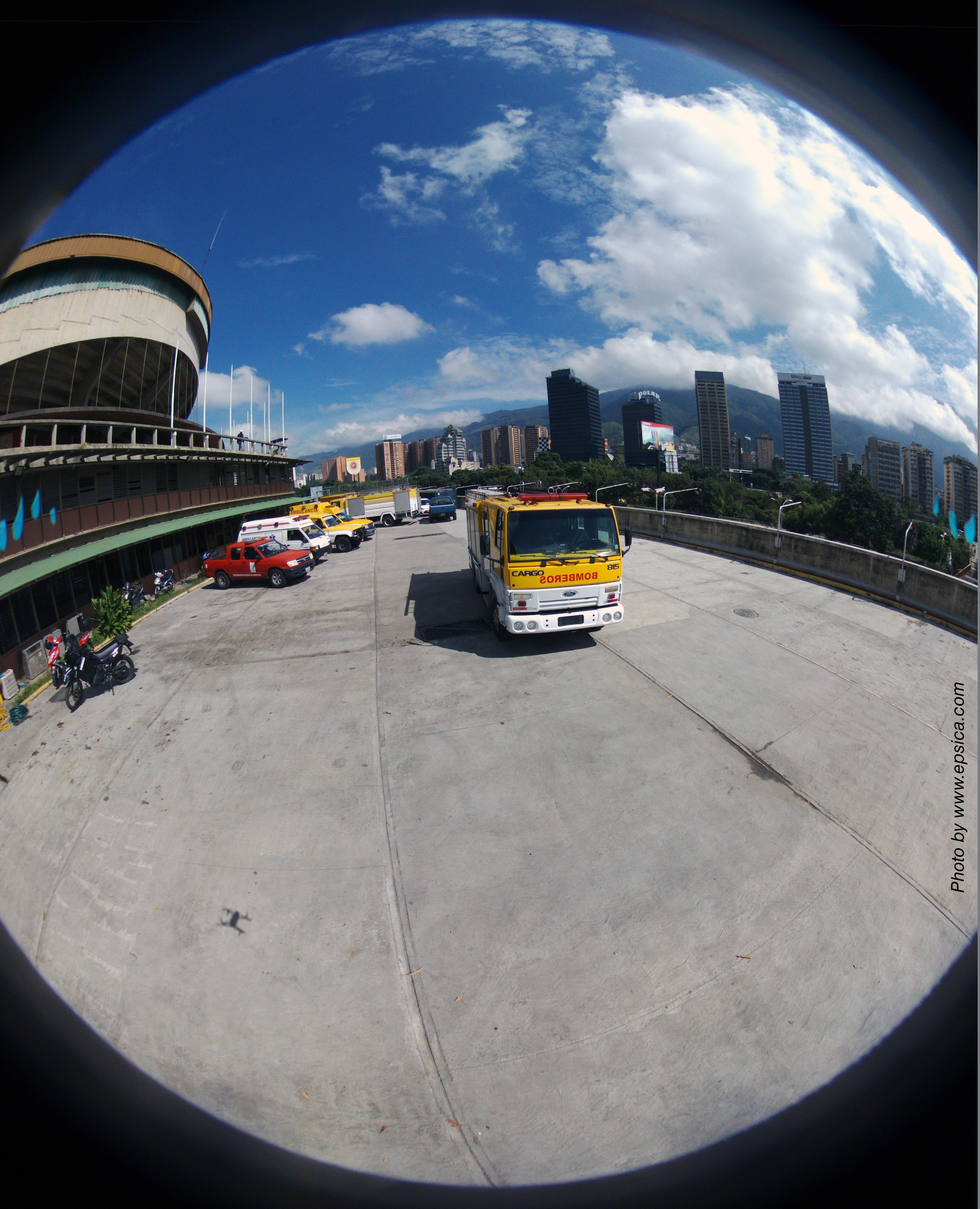 Estación en toma desde dron